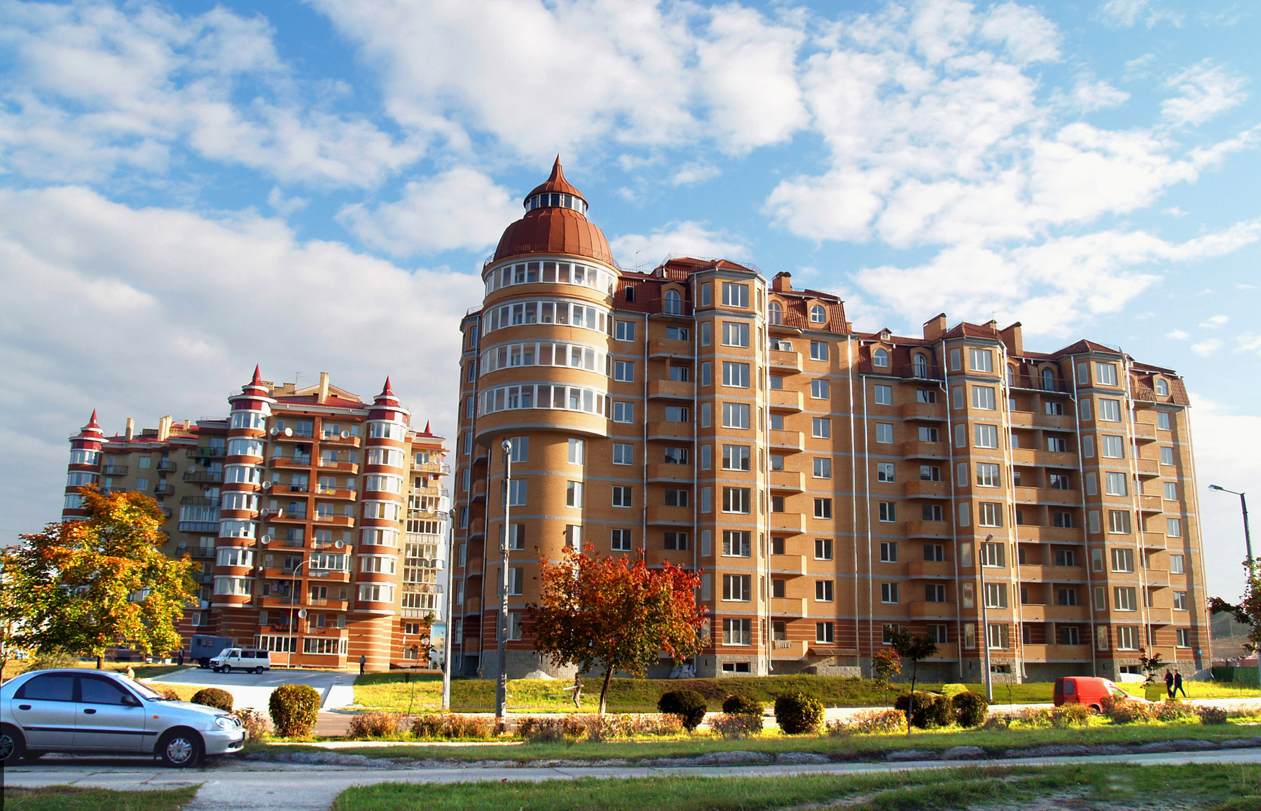 Жилой дом в Вараше. Ровенская область. Украина.